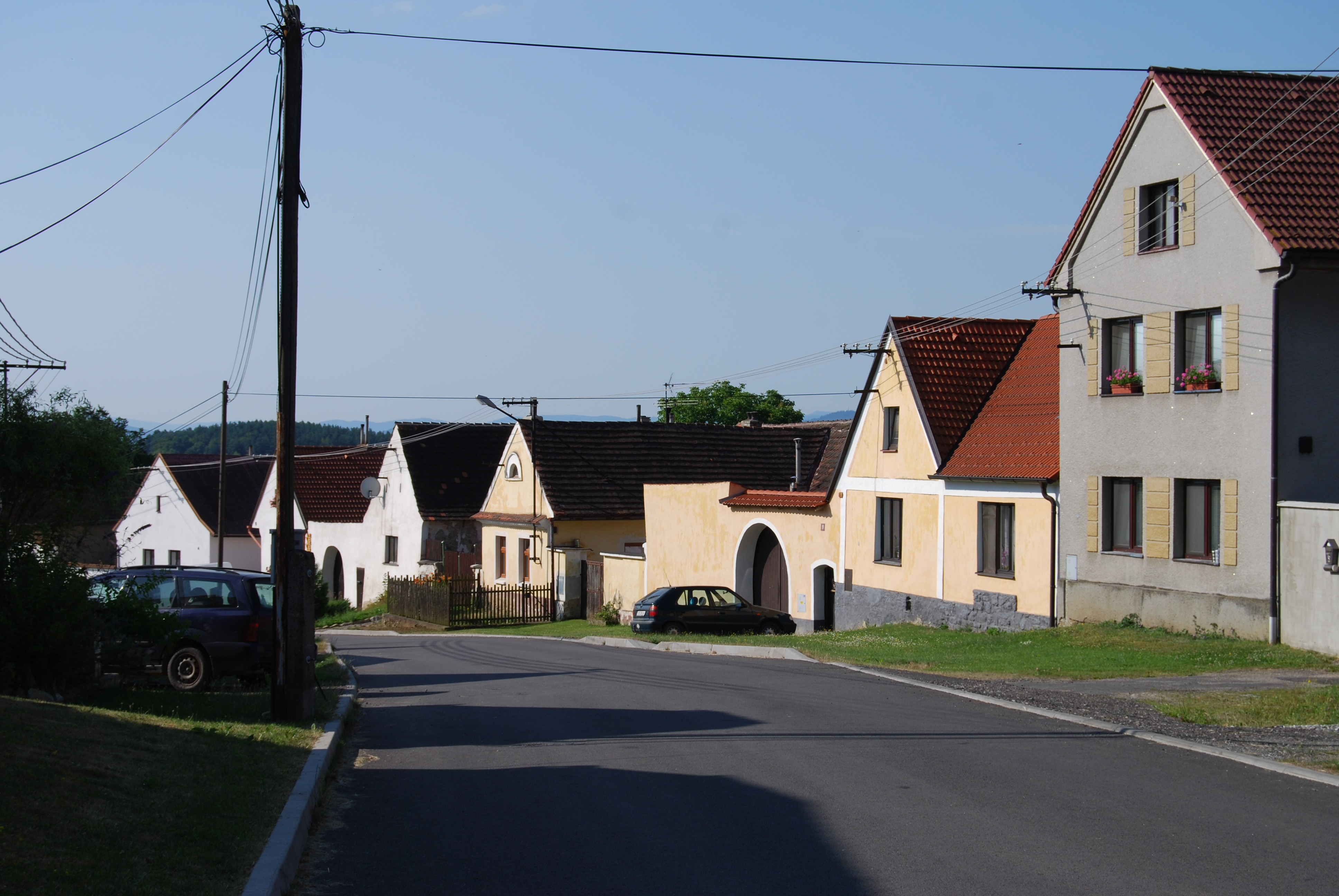 Pohled na část vesnice. Zadní Zborovice je část obce Třebohostice v okrese Strakonice. Česká republika. - Google Maps - Google Earth